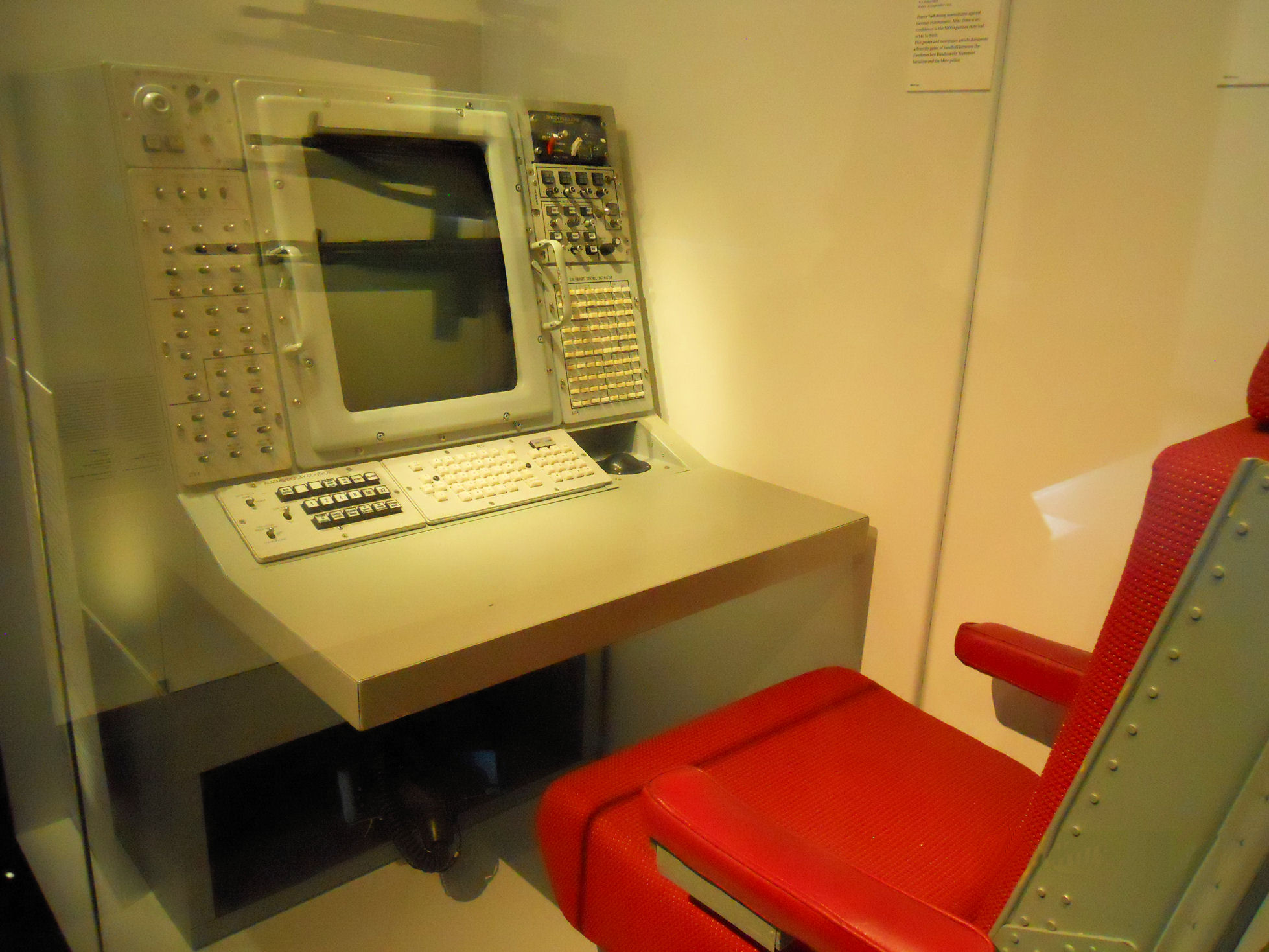 Sitz mit Konsole in einem Awacs-Flugzeug (ab 1982)